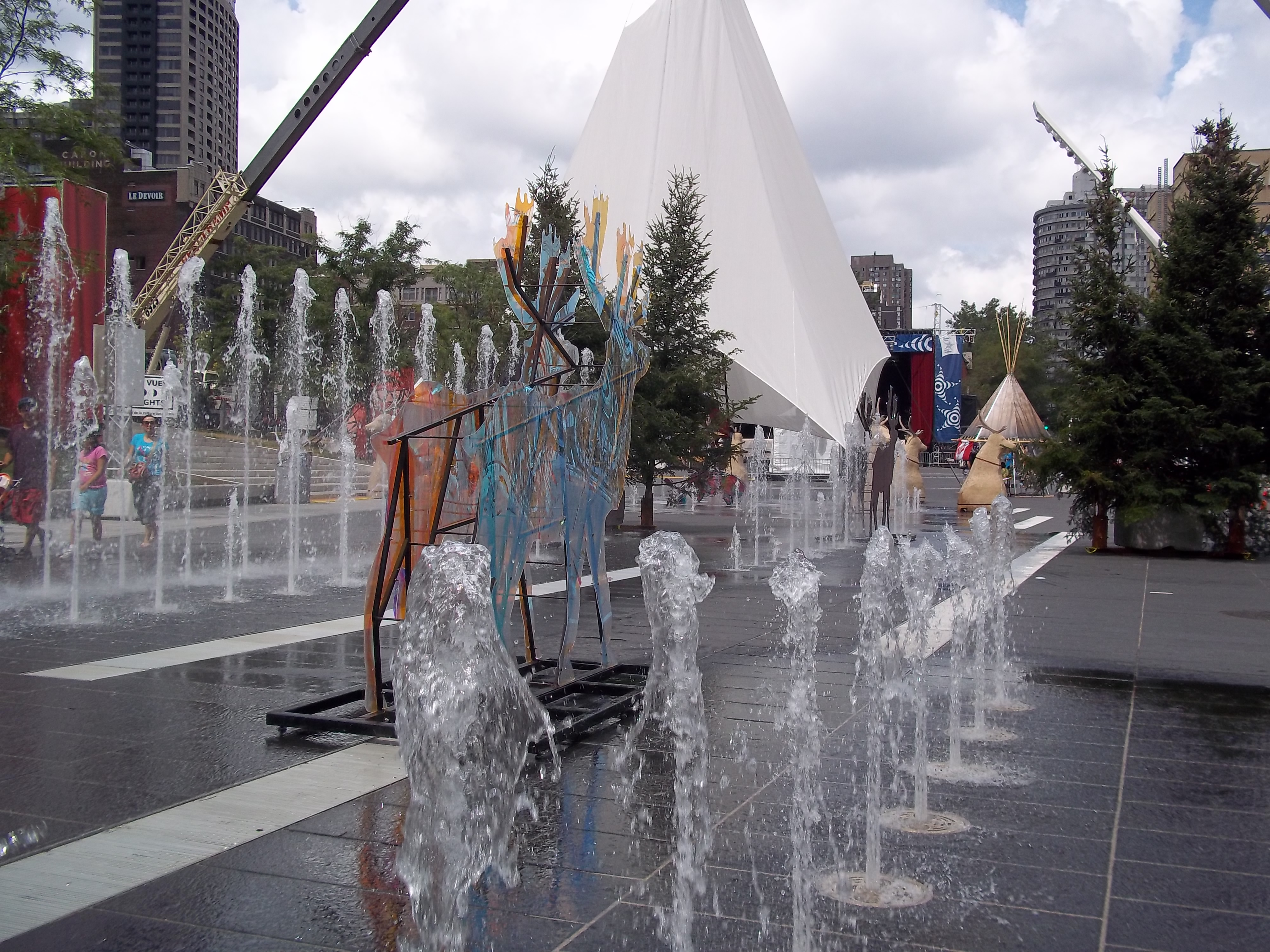 Aménagement de la Place des Festival lors de l'événement annuel Présence autochtone, à Montréal